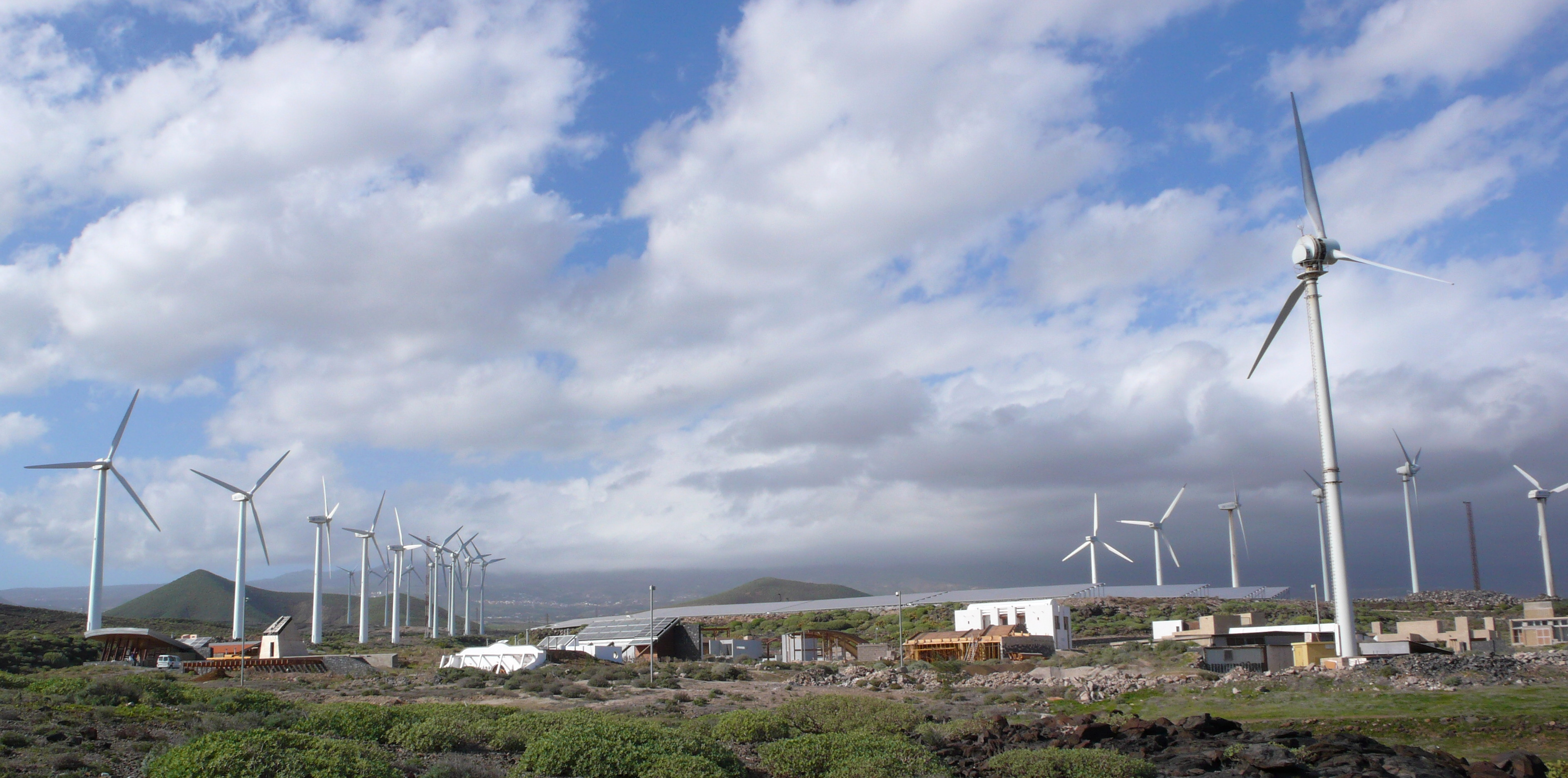 Instalaciones del Instituto Tecnológico y de Energías Renovables de Tenerife en Granadilla de Abona.